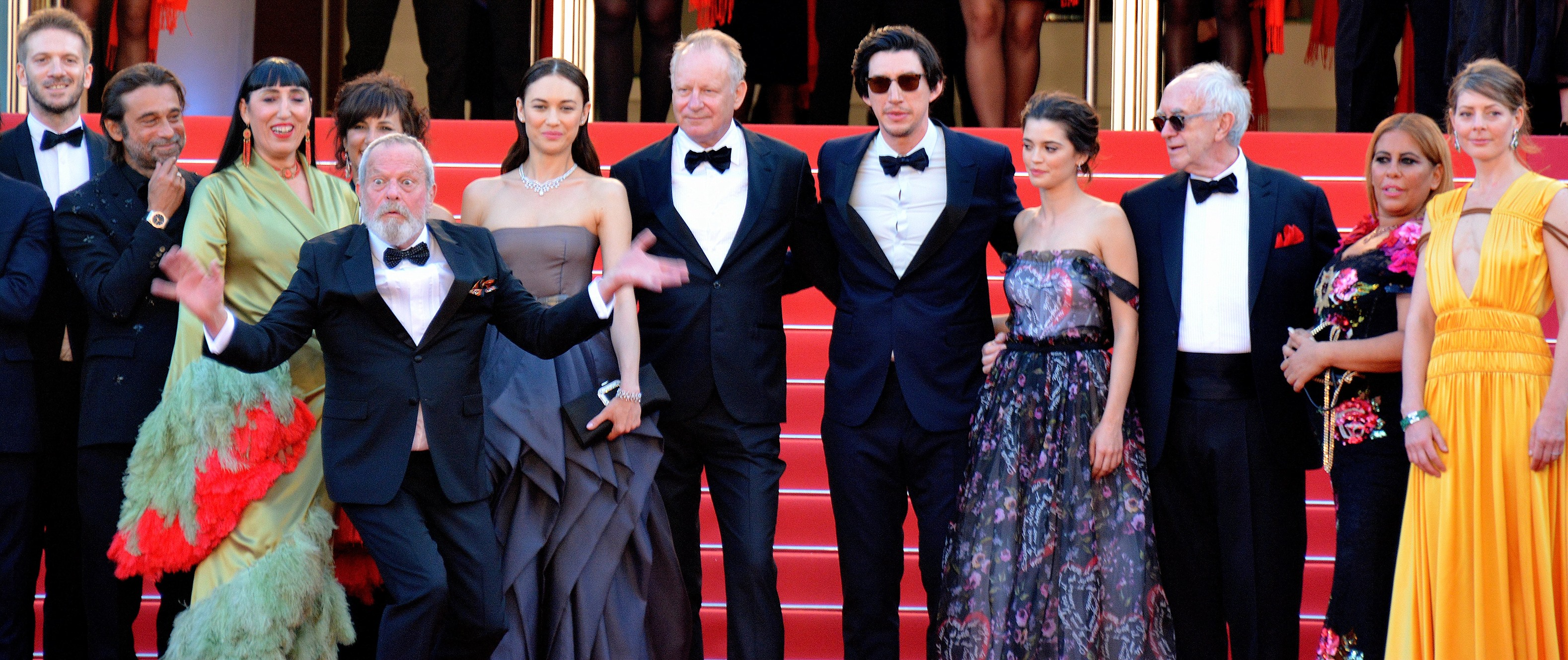 Présentation de "L'Homme qui tua Don Quichotte" au festival de Cannes